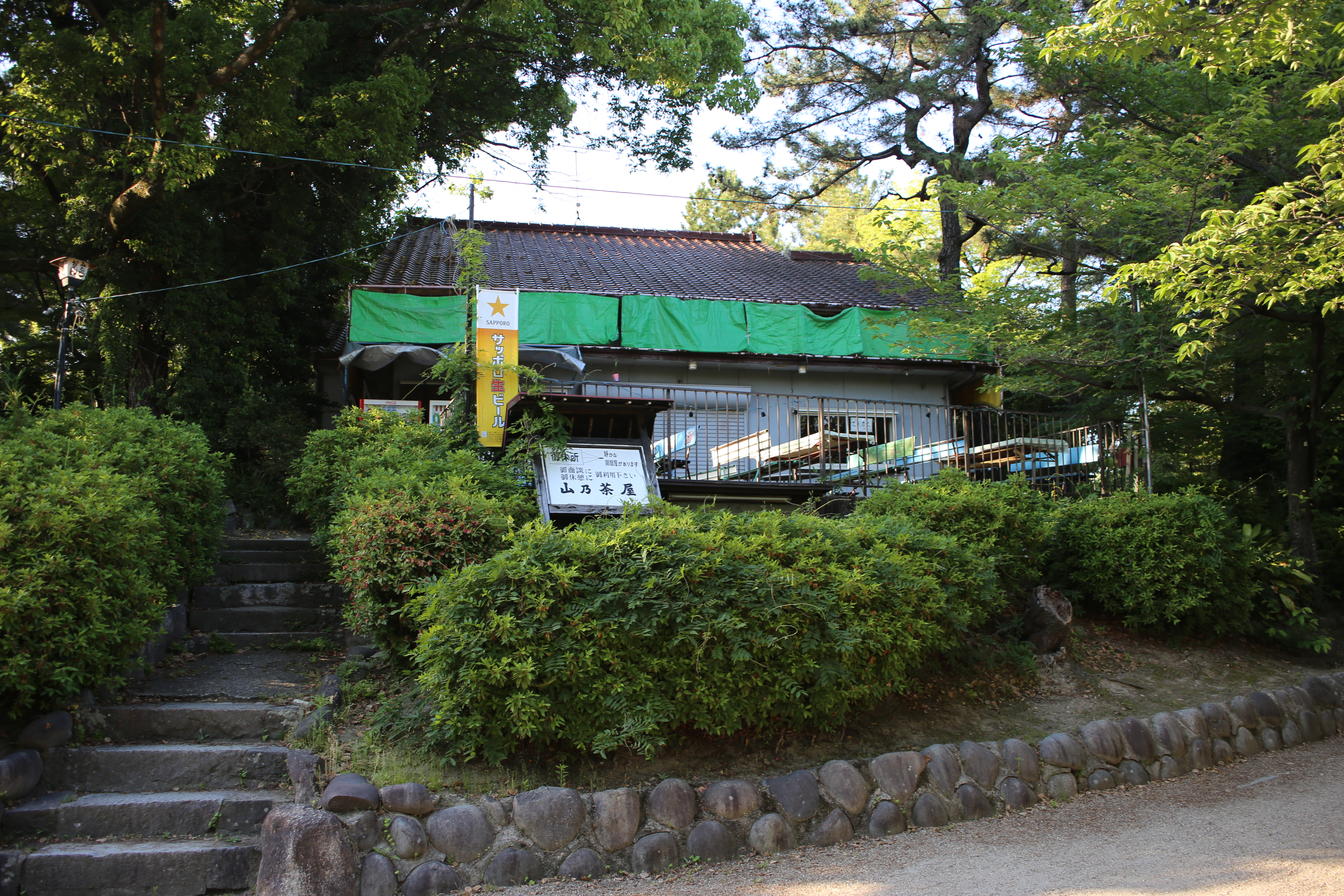 名古屋市昭和区鶴舞の鶴舞公園内の山乃茶屋